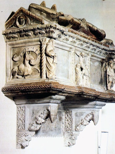 Arca di Prendiparte Pico nella chiesa di San Francesco d'Assisi a Mirandola